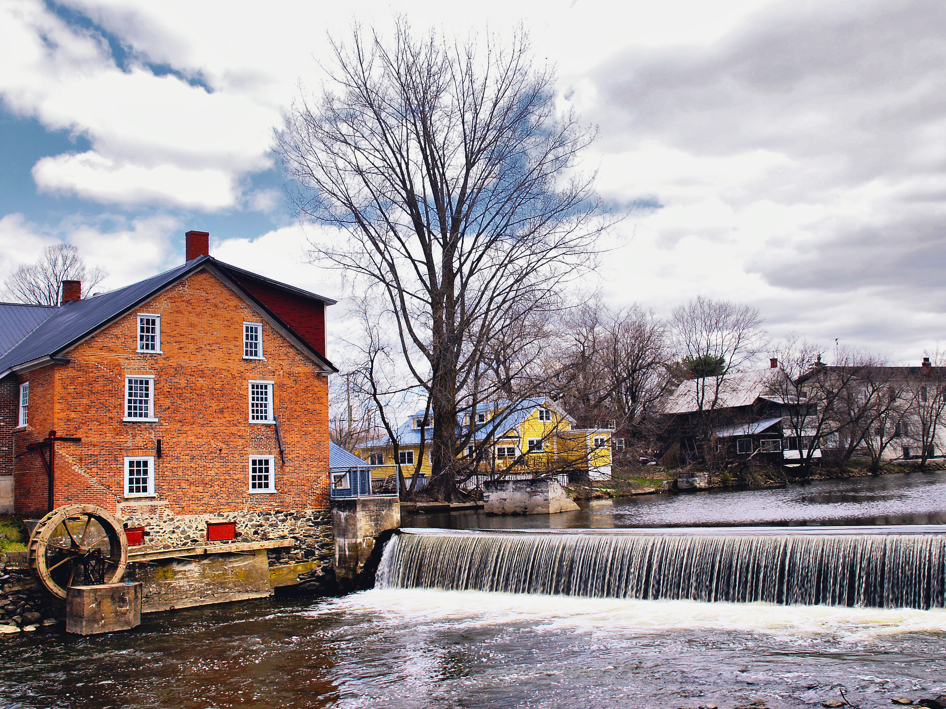 Stanbridge East - Ancien moulin Cornell devenu Musée Missisquoi